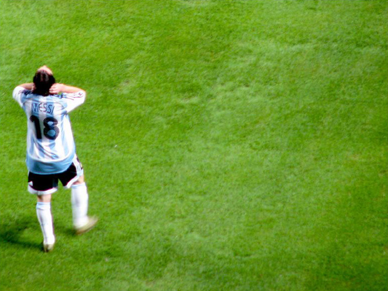 Lionel Messi durante el partido Argentina vs. Perú, Copa América 2007, Venezuela.